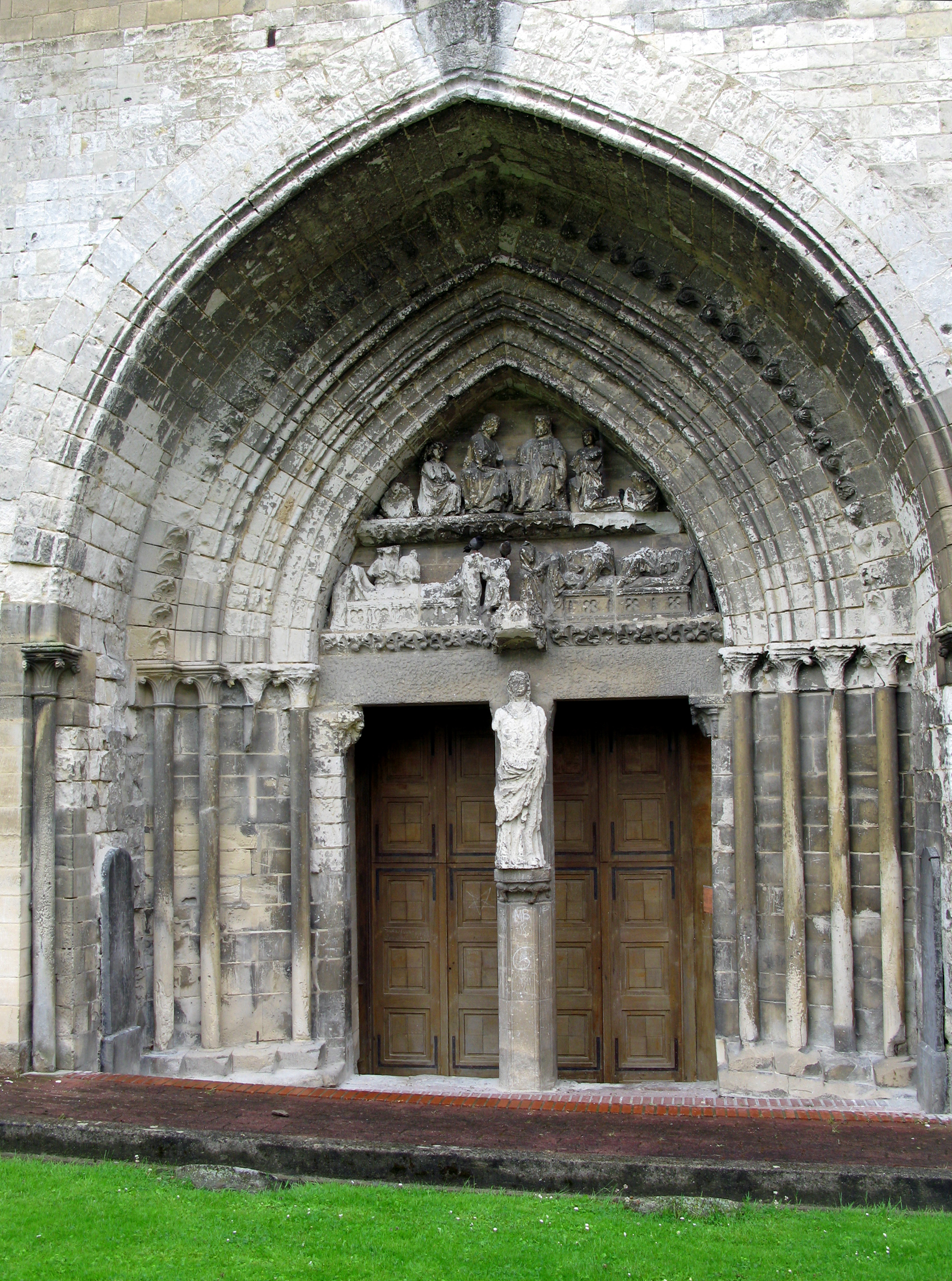 Longpré-les-Corps-Saints (Somme, France) - .